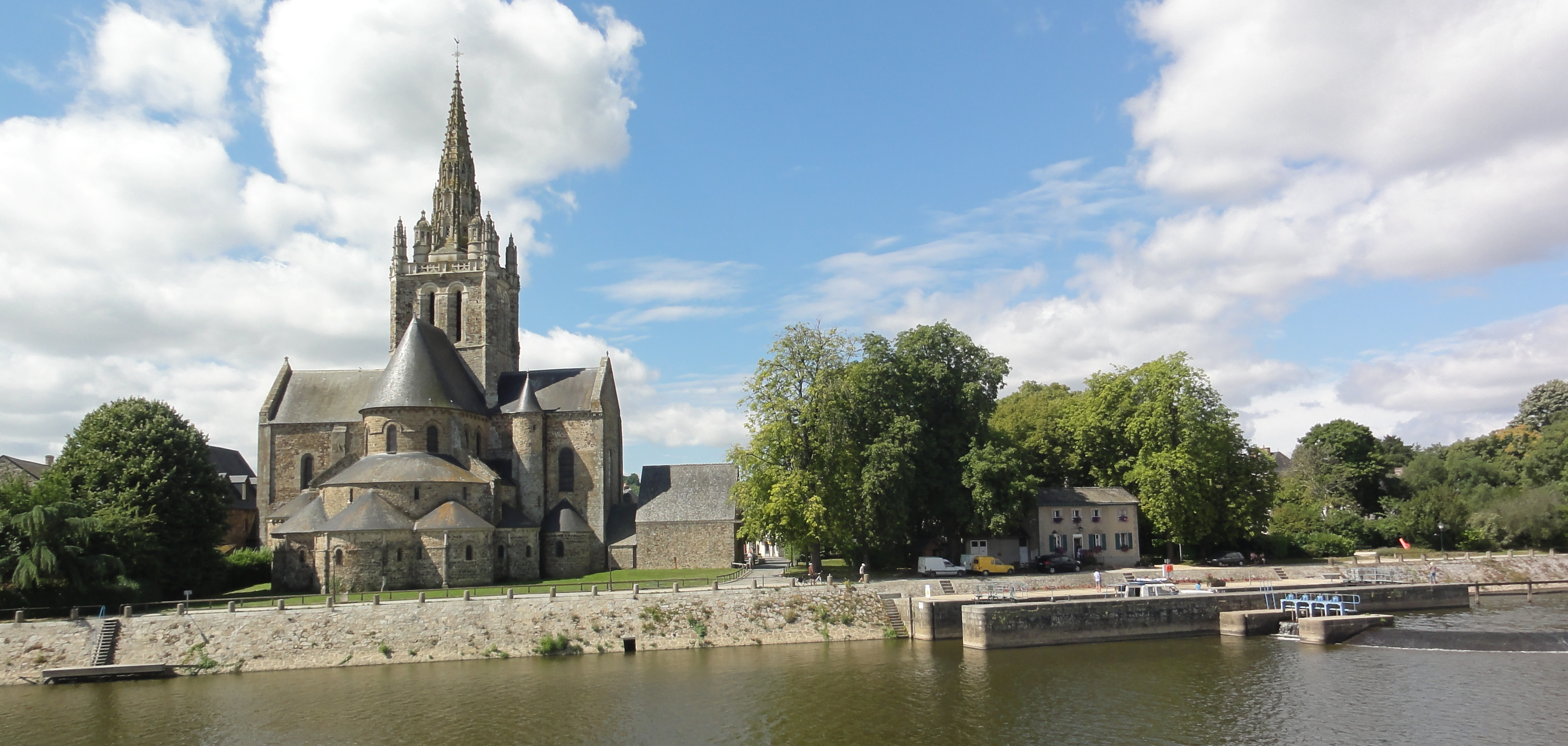 Basilique et écluse d'Avesnières, Laval, Mayenne, France.